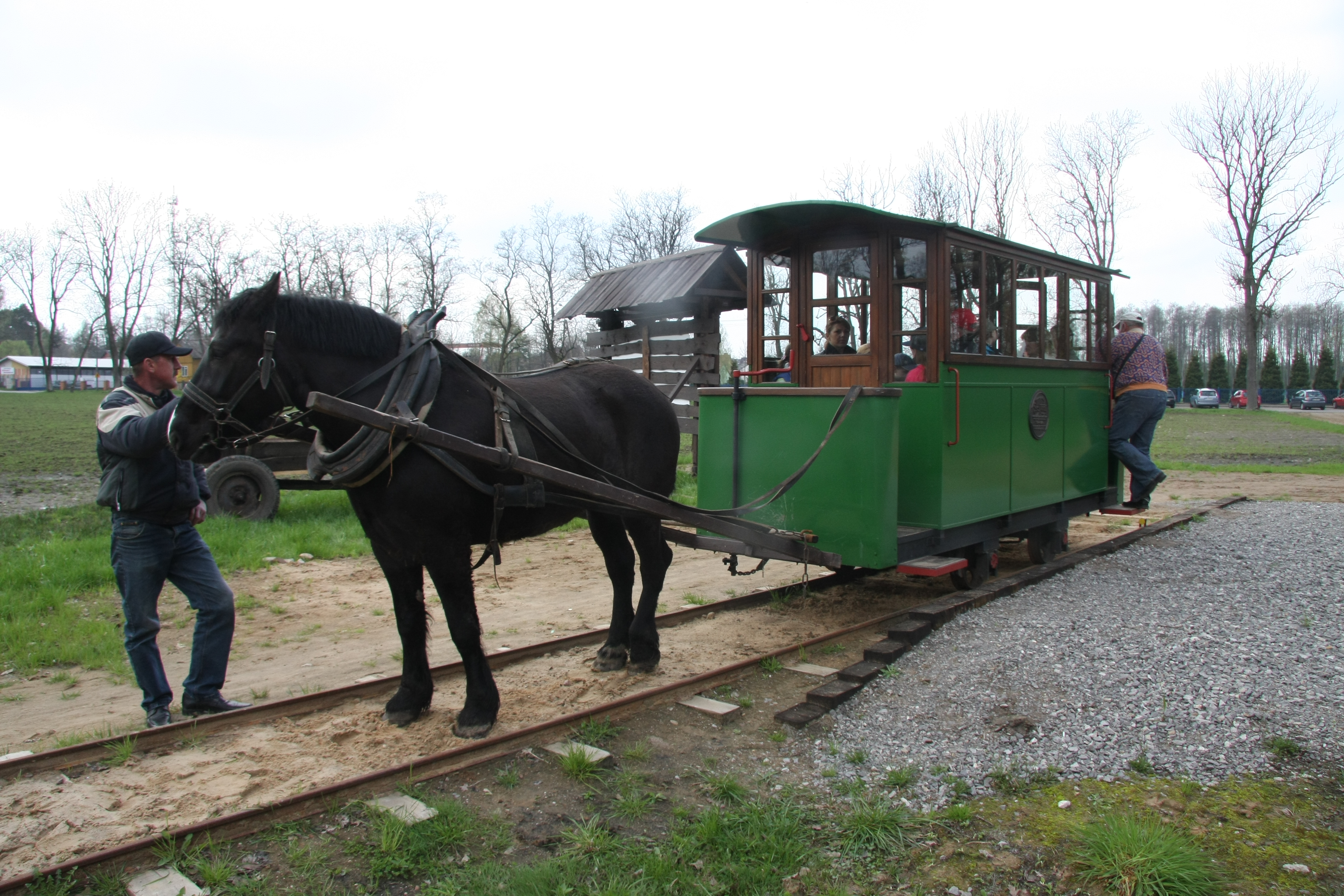 Tramwaj konny w Mrozach, stacja w Mrozach